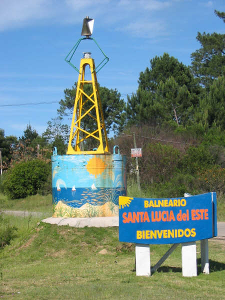 Entrada al balneario Santa Lucia del Este en el departamento de Canelones, Uruguay.